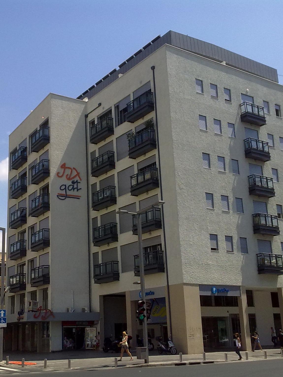 קולנוע גת, ברחוב אבן גבירול 62, תל אביב.